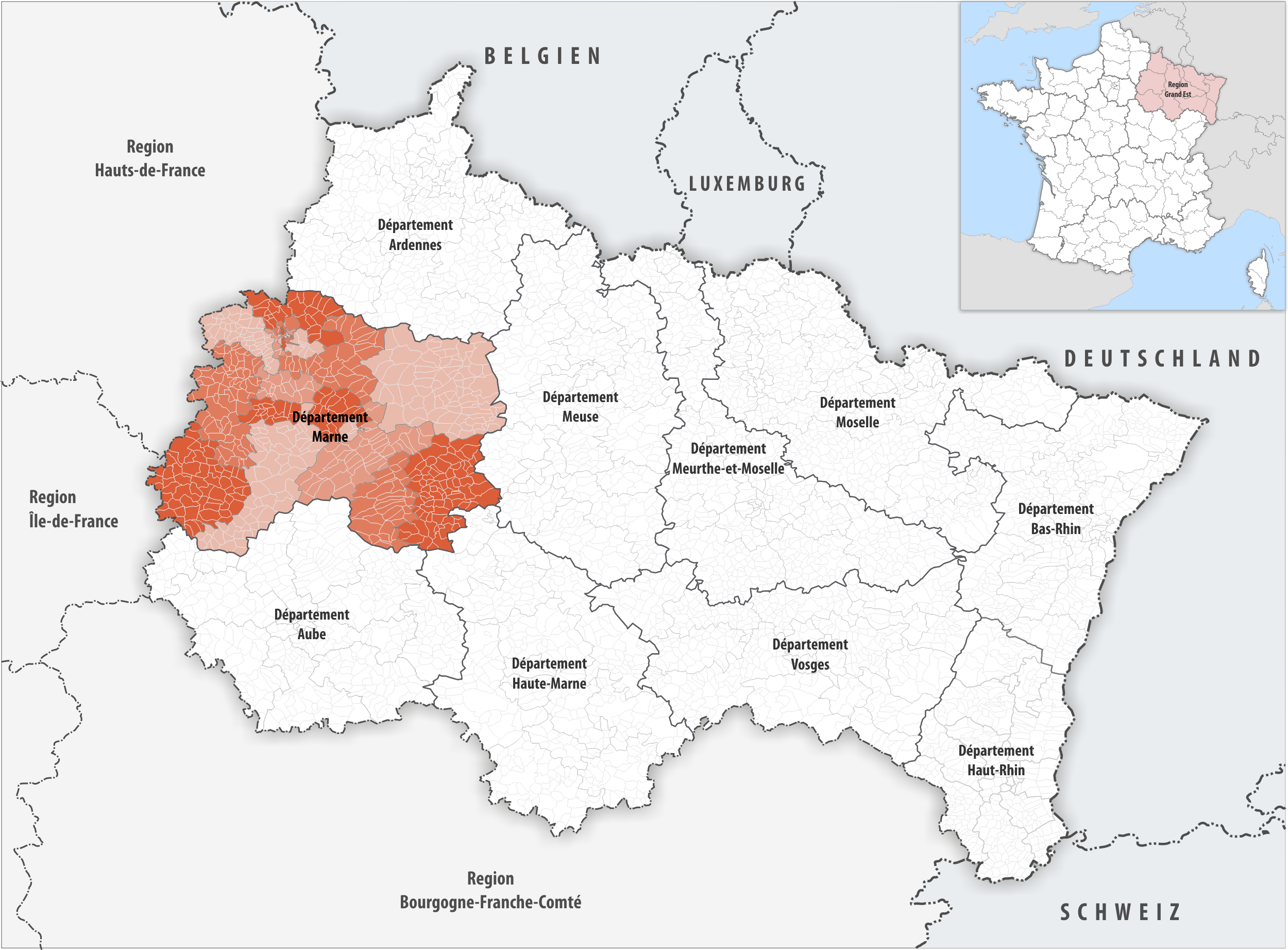 Lage des Departements Marne